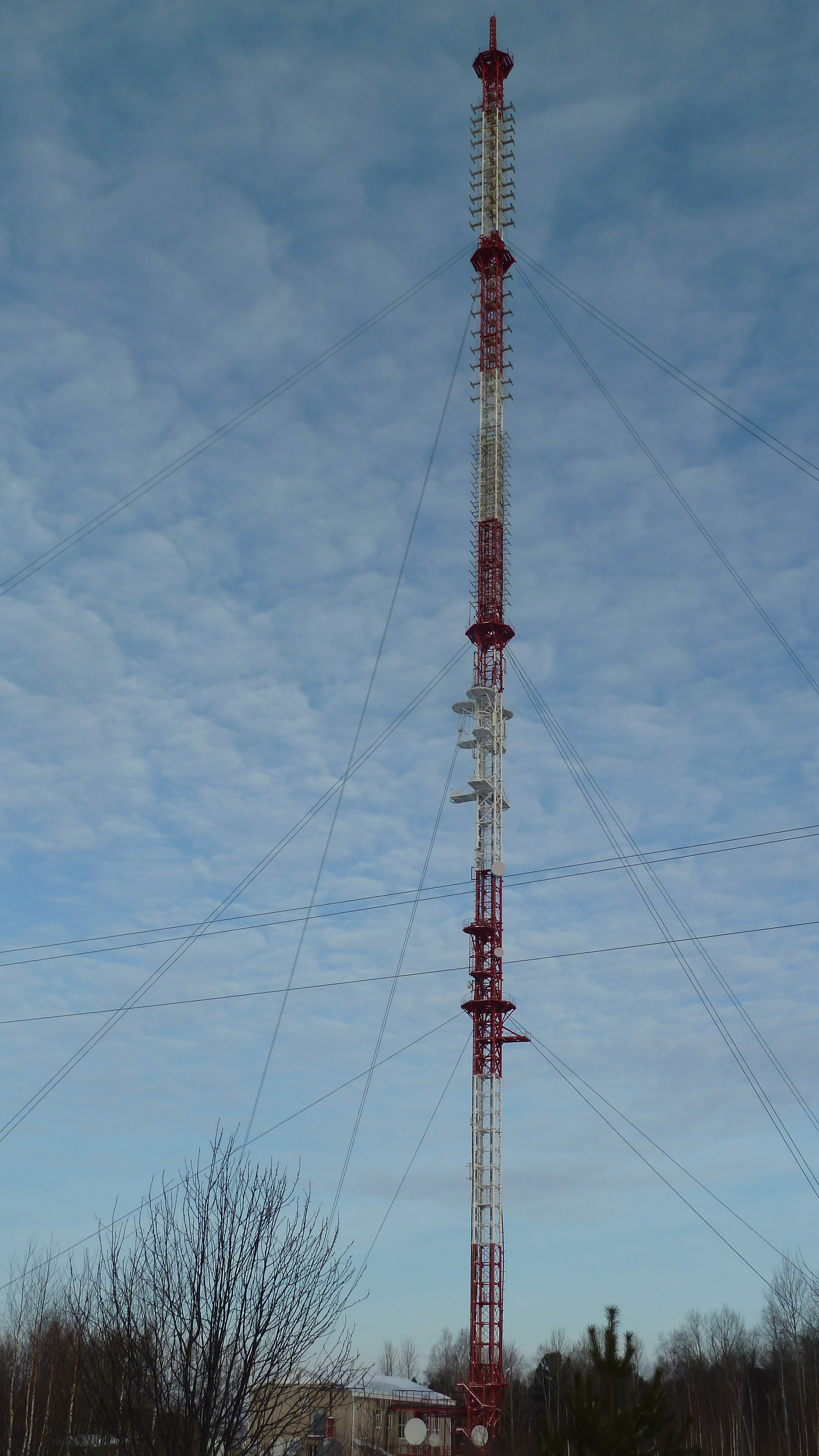 Фото телевизионной мачты в городе Колпашево Томской области